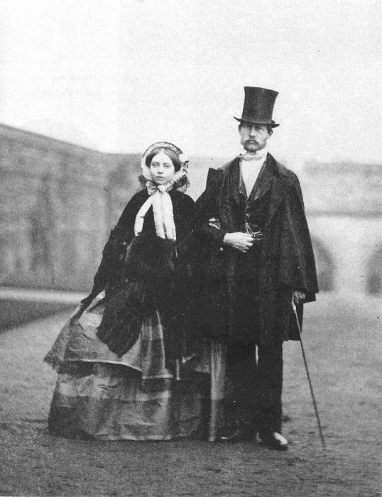 Princesa Vitória do Reino Unido e seu marido, o Príncipe-herdeiro Frederico da Prússia, quatro dias após seu casamento.